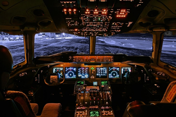 Sistema de Control de un avión